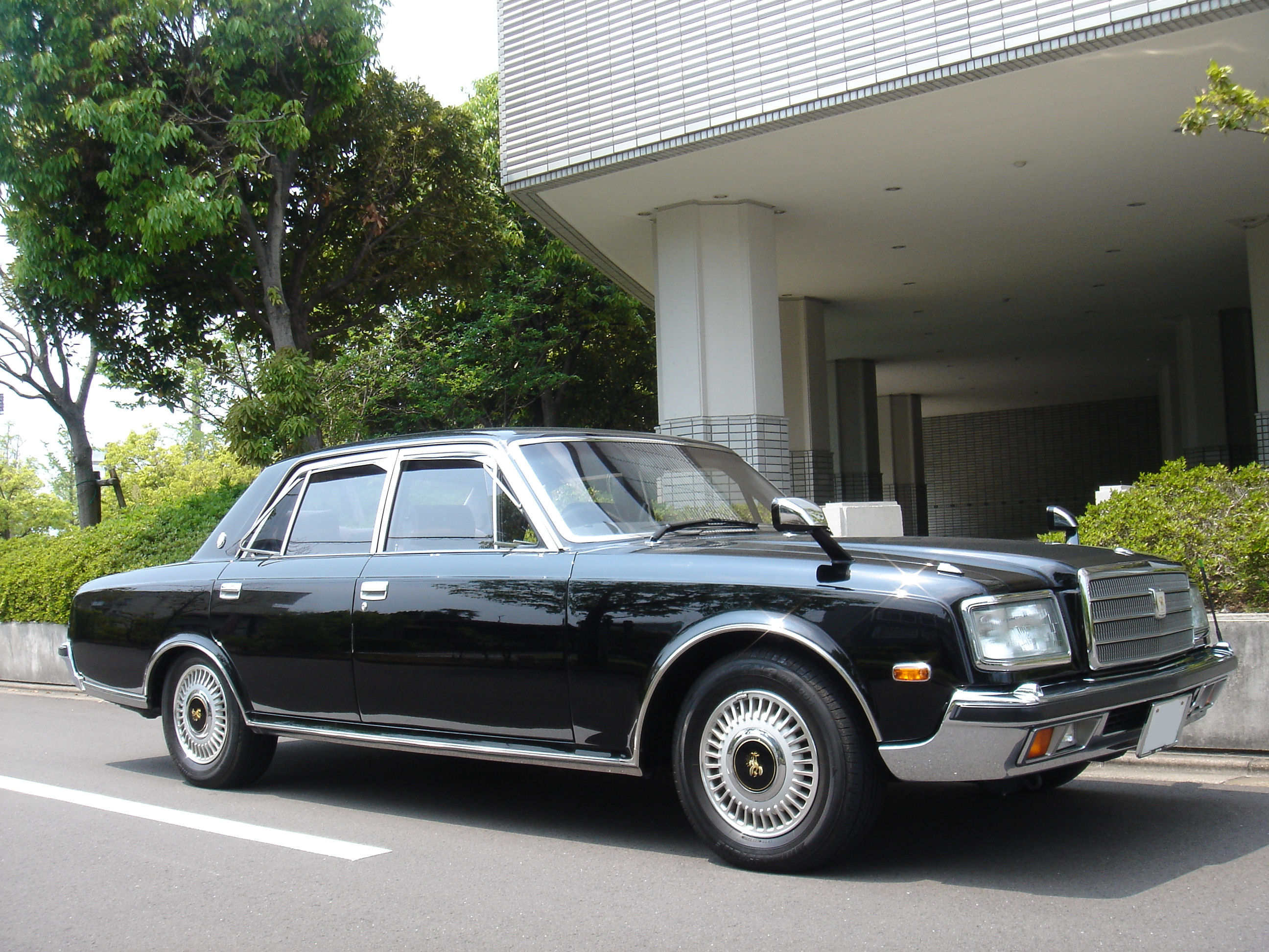 VG40 final model